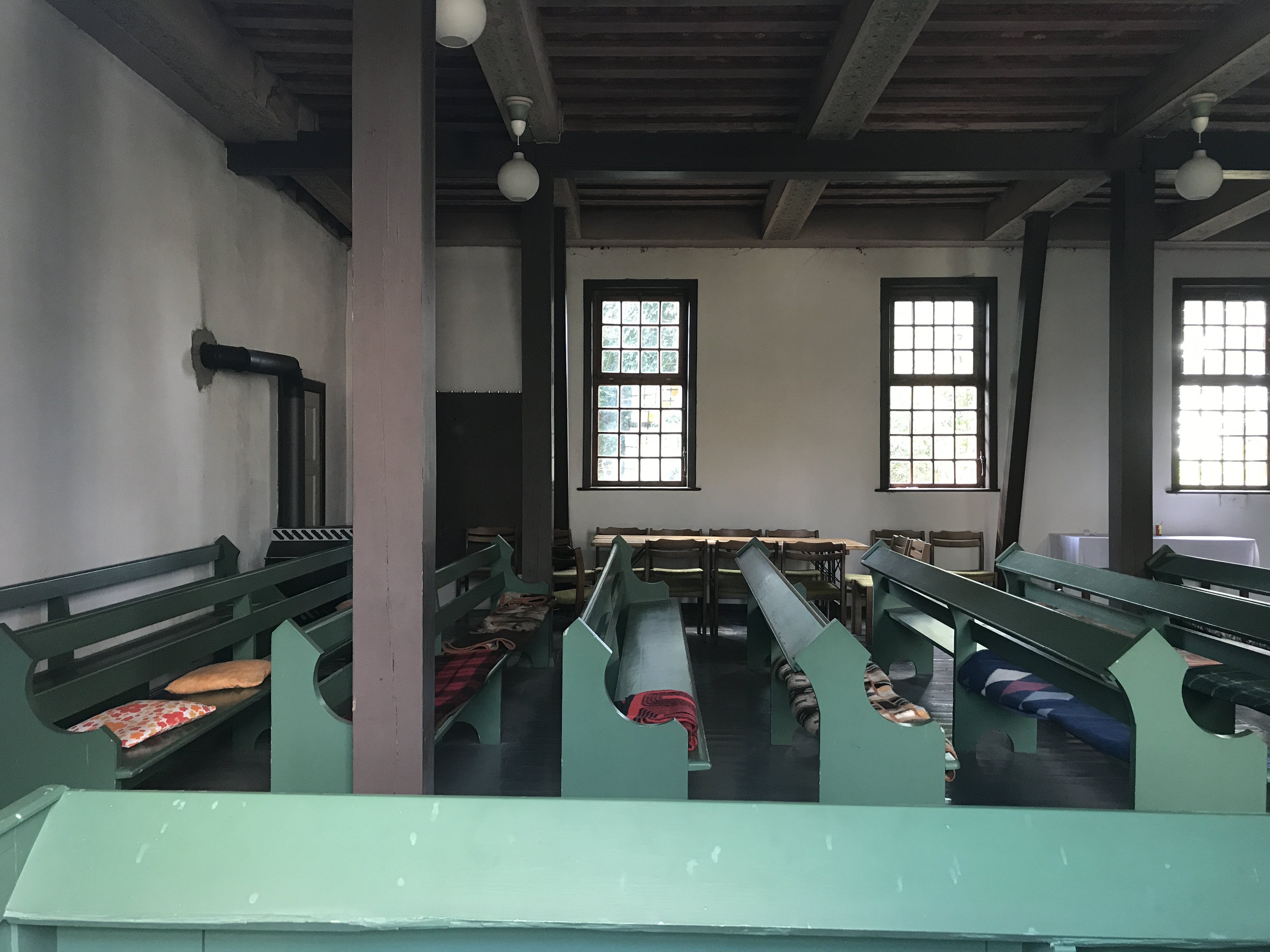 Die Dorfkirche Wilmersdorf entstand 1936 in einer ehemaligen Scheune in Wilmersdorf, einem Ortsteil der Stadt Angermünde im Landkreis Uckermark im Land Brandenburg. Im Innern stehen unter anderem eine Kanzel sowie ein Patronatsgestühl aus der Bauzeit.